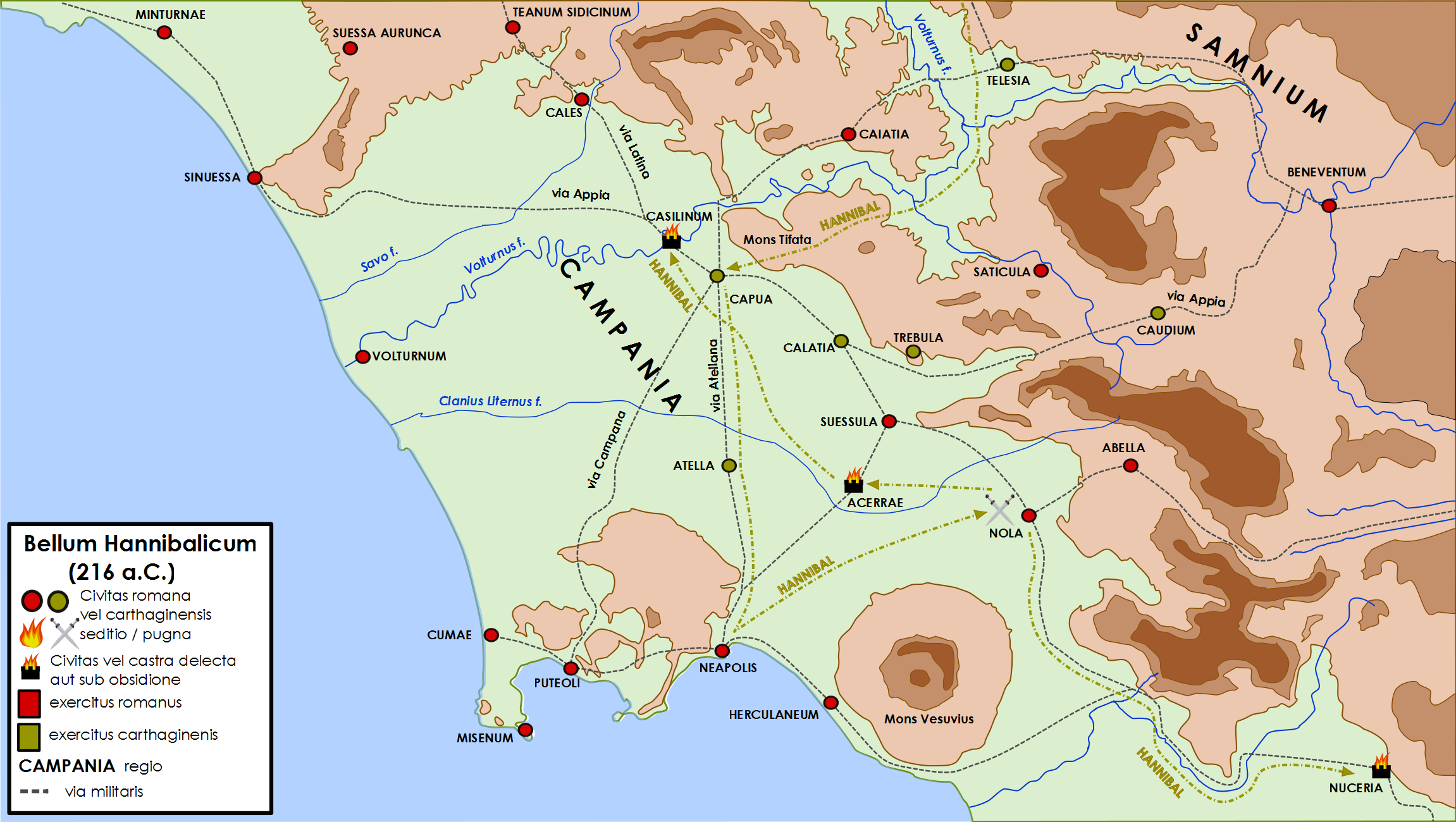 Campagna militare di Annibale del 216 a.C. in Campania